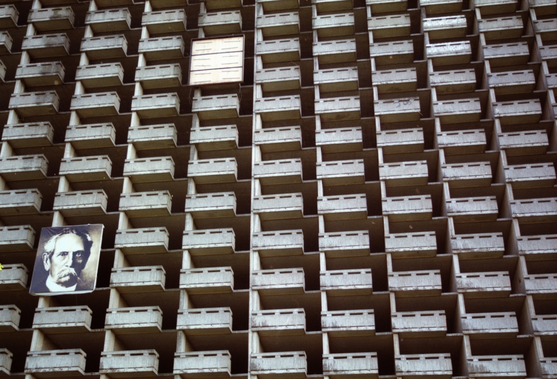 Kaiserbau – Hochhausruine bei Troisdorf, Bonn, Deutschland/Germany.